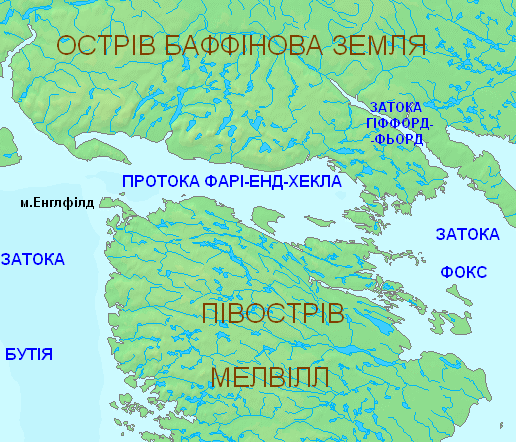 Мапа протоки Фарі-енд-Хекла